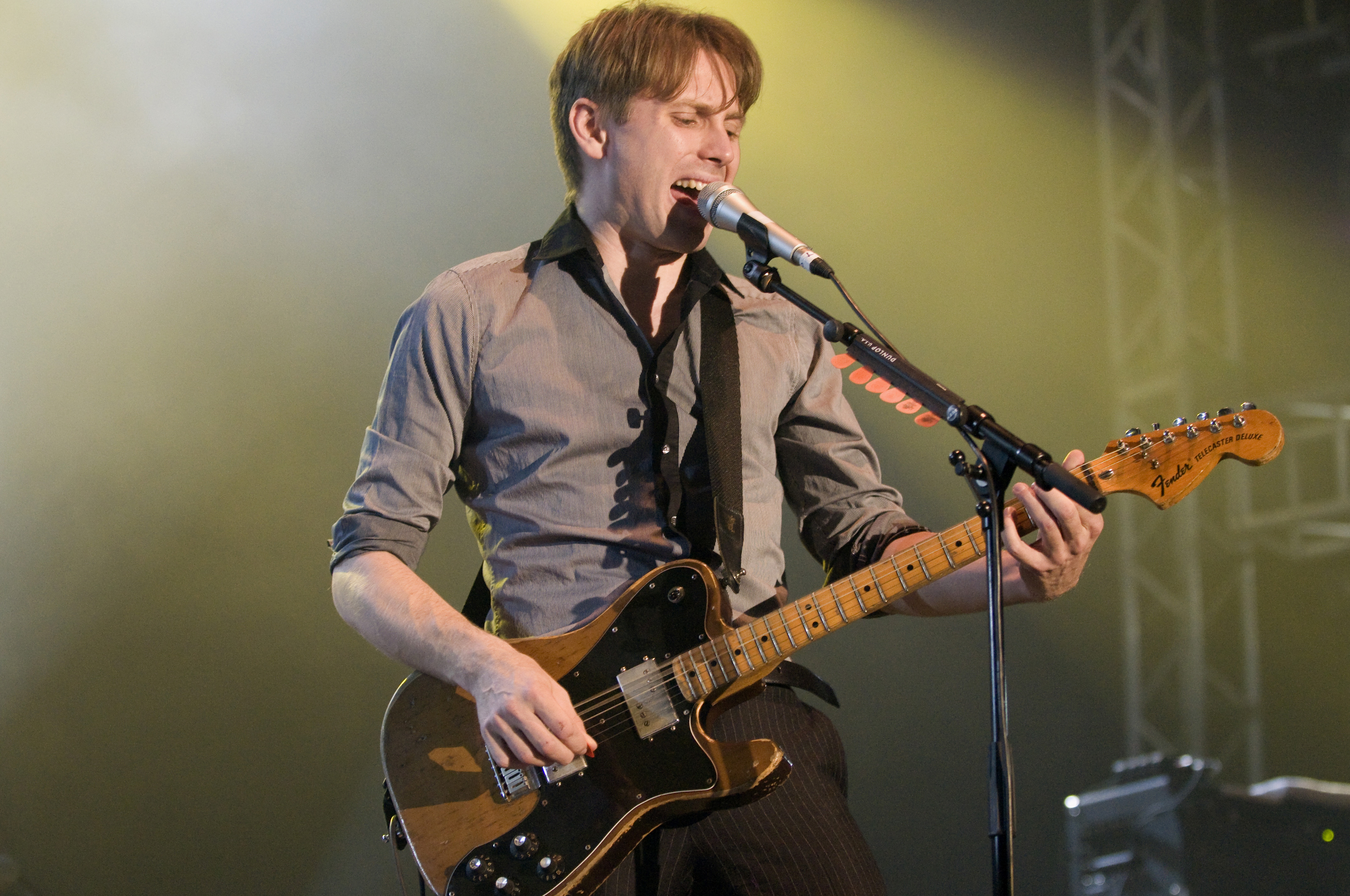 Franz Ferdinand (band)